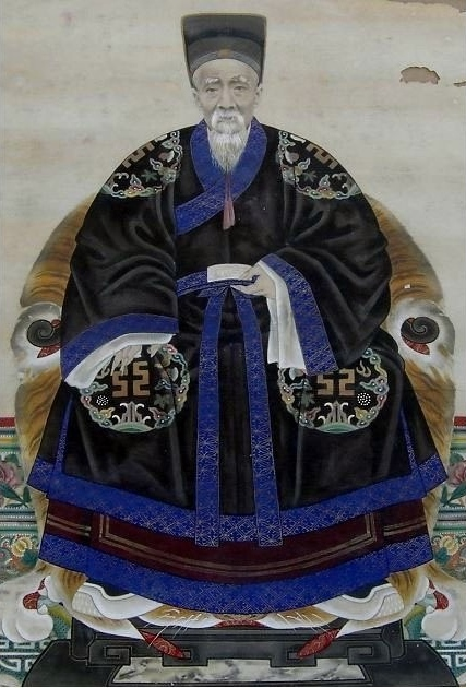 清代官員祭服畫像